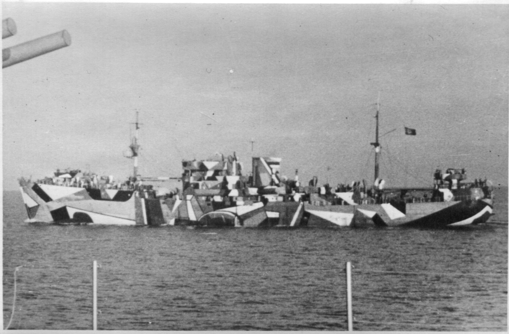 Bild-Quelle: aus Privatbesitz (Karl Gräf/ Meteorologe der Kriegsmarine)